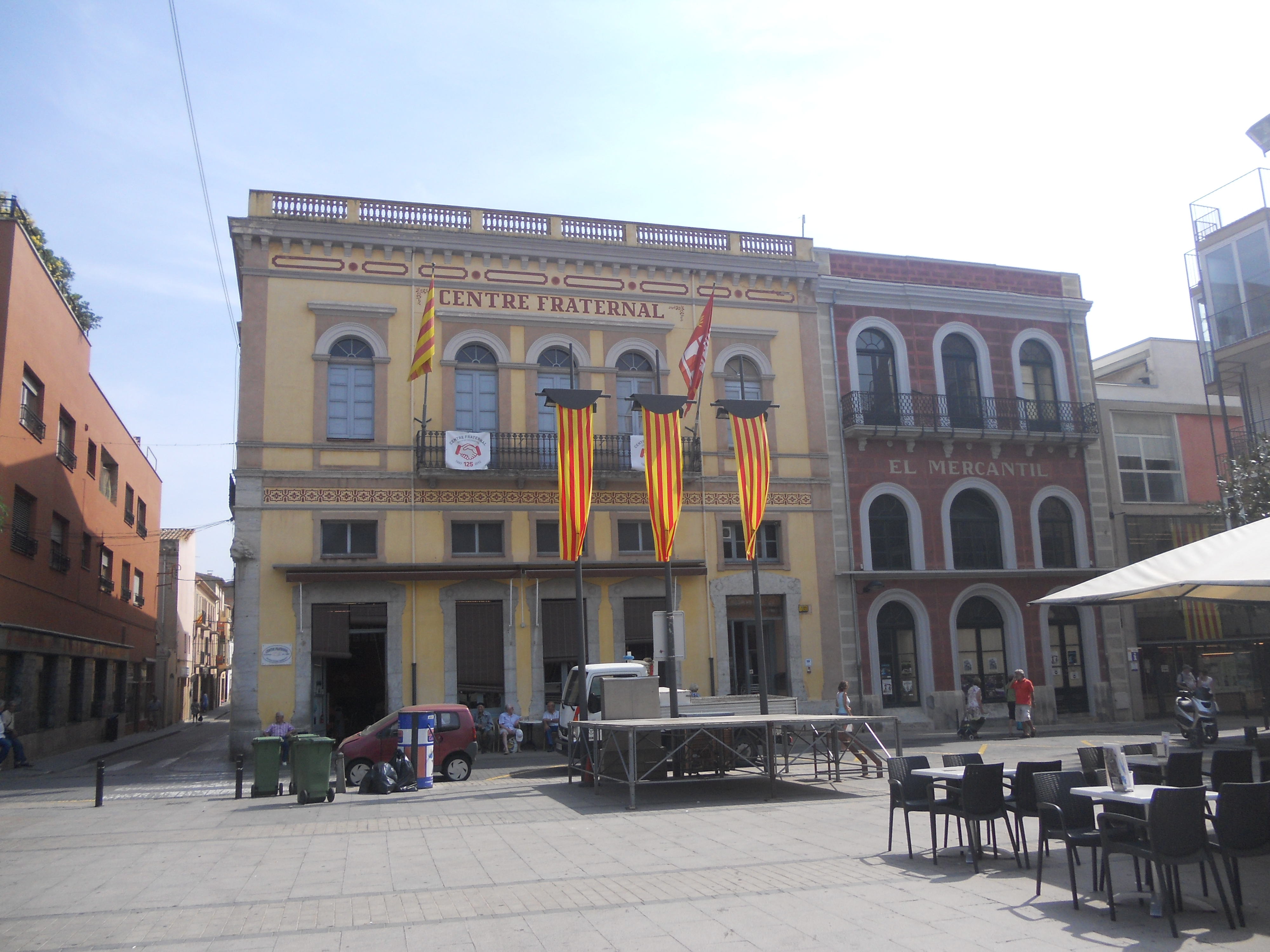 Centre Fraternal (Palafrugell)